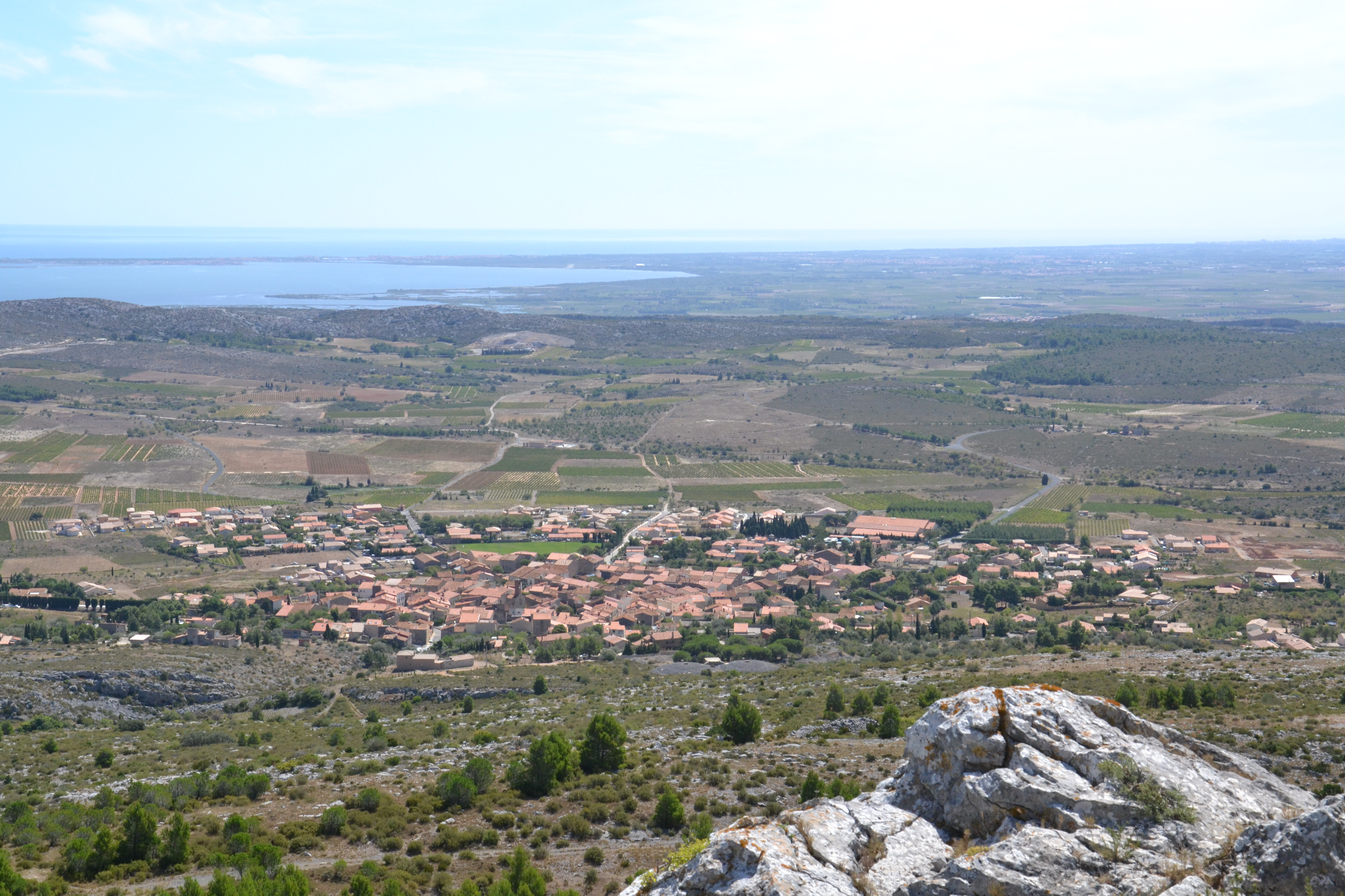 Le village d'Opoul, commune d'Opoul-Périllos (Pyrénées-Orientales, France)